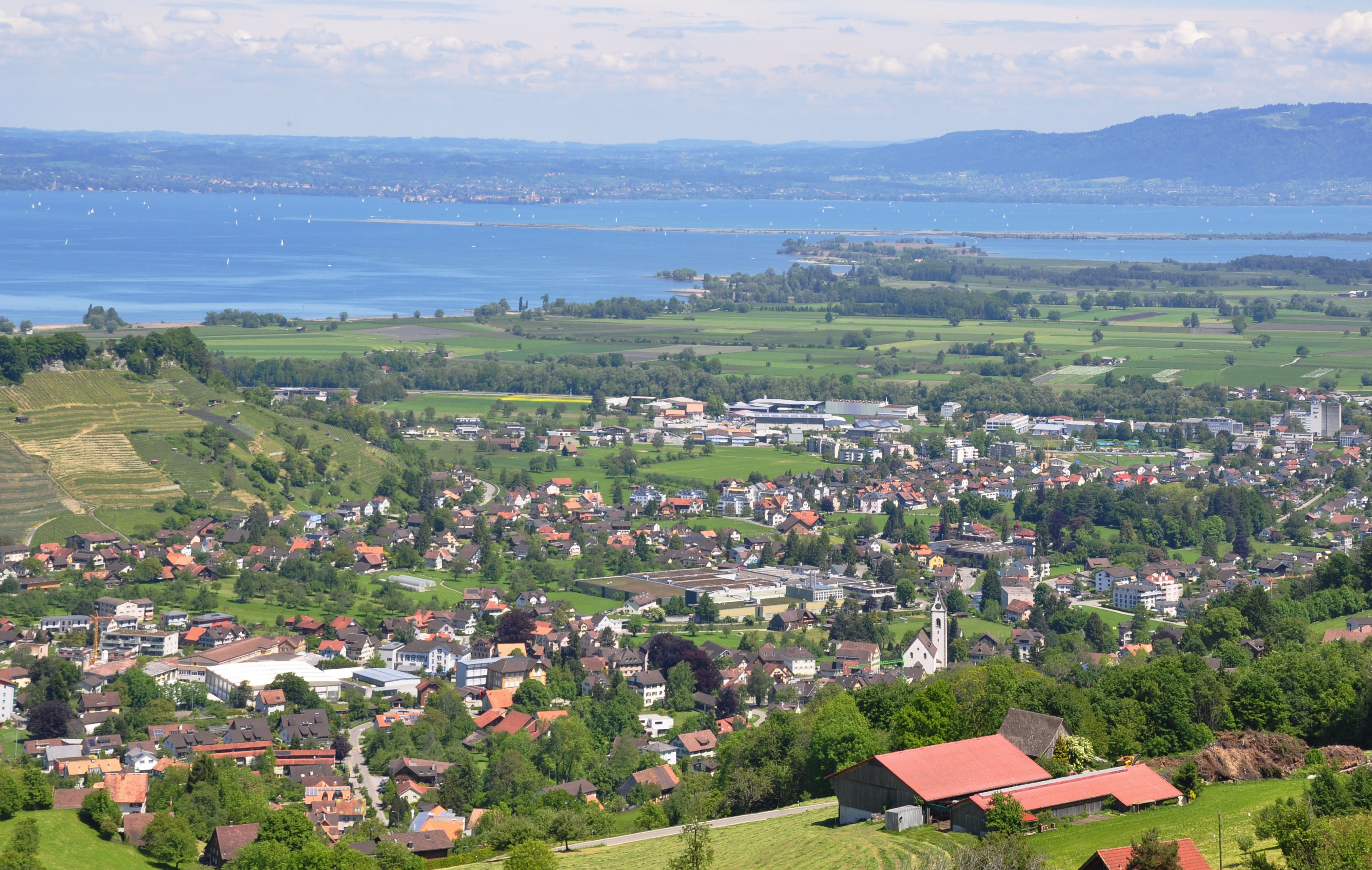 Blick von Wolfhalden AR (Höhe Bleichestrasse) in Richtung Bodensee über Thal SG